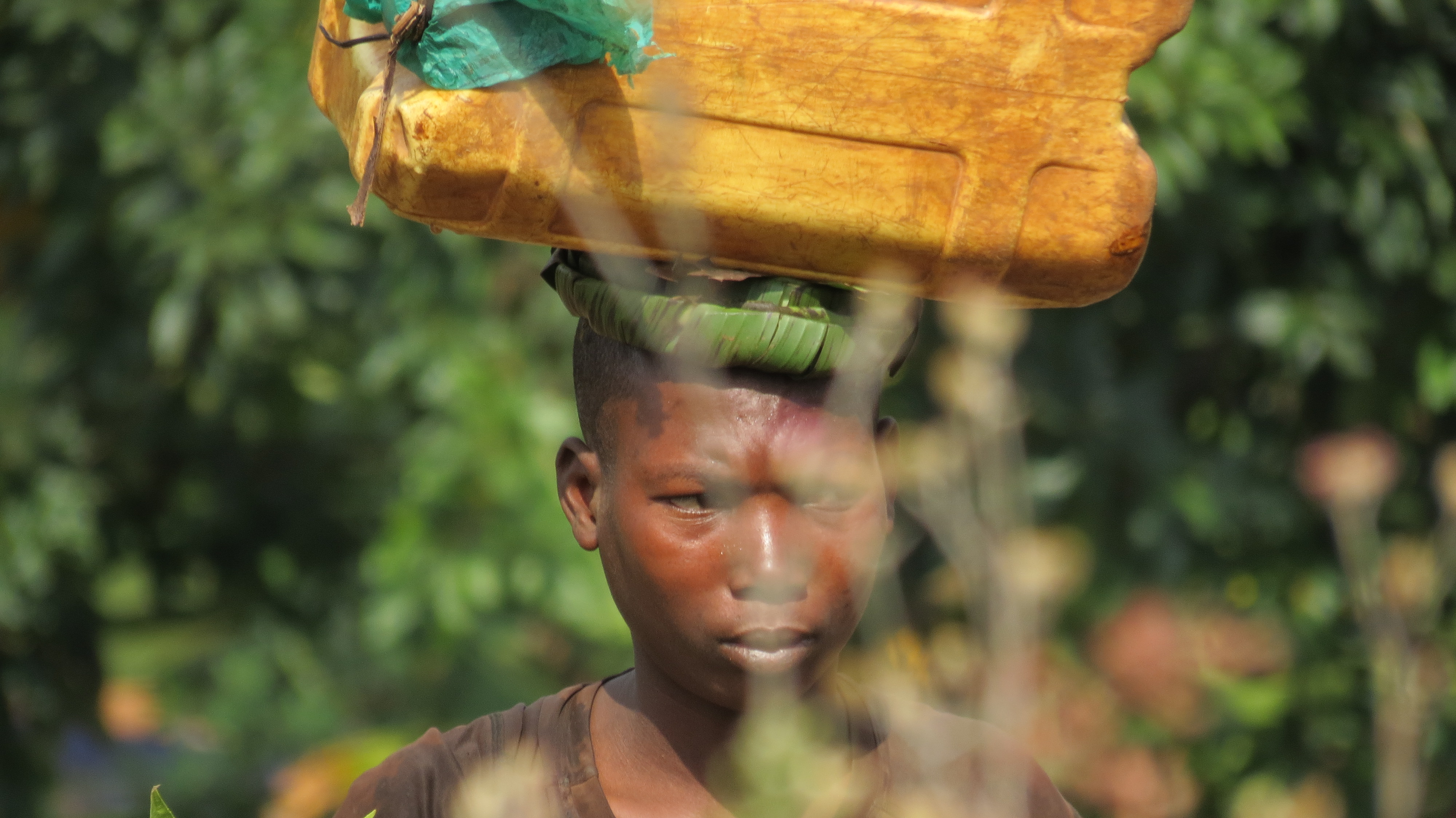 Une femme avec un bidon This is an image of "African people at work" from Burundi